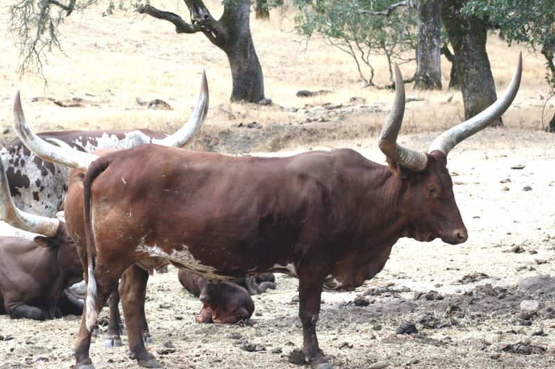 Watusi Cattle